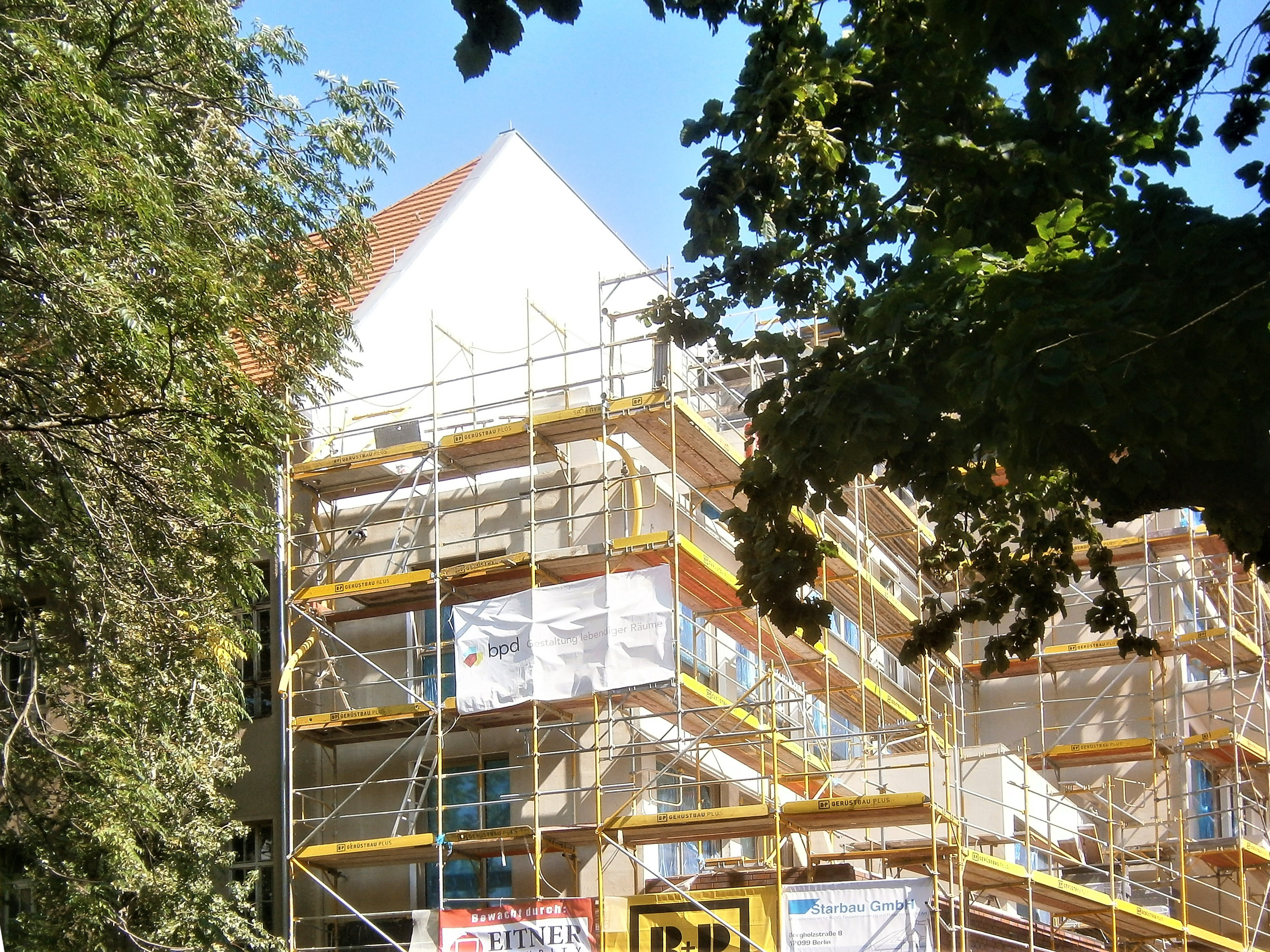 Die Andreasstraße ist ein Straße im Berliner Bezirk Friedrichshain-Kreuzberg, Ortsteil Friedrichshain zwischen Holzmarkstraße/ Stralauer Platz (nahe Ostbahnhof) und der Karl-Marx-Allee. Das Bild zeigt den Bau der Wohnanlage Andreasstraße 21a an der Rückseite der Andreasschule.